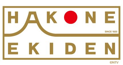 日本テレビ系「箱根駅伝」シンボルマーク